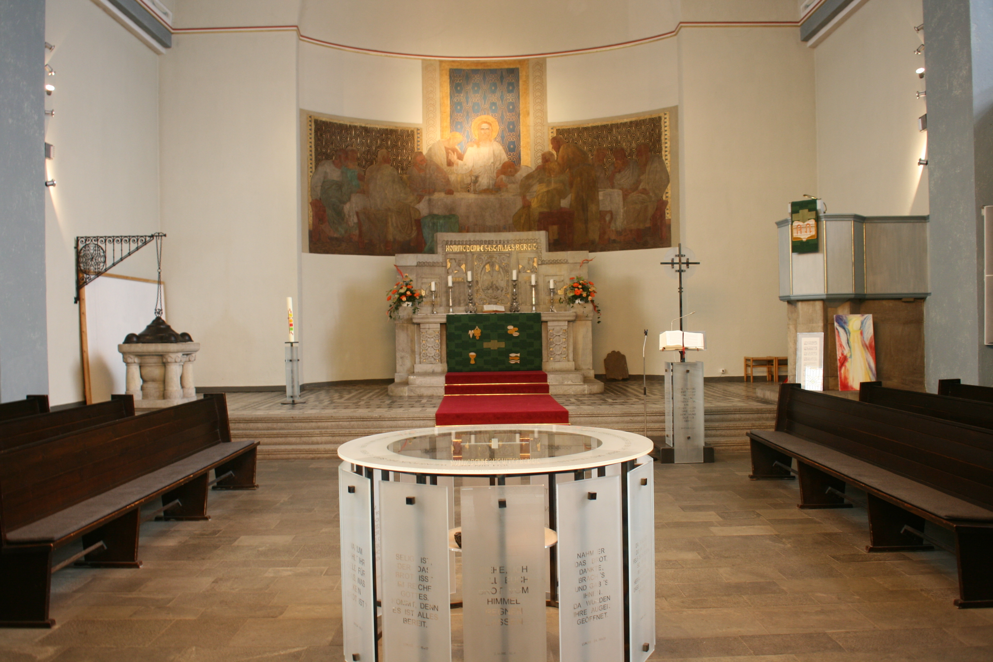 Lutherkirche, Klinikstraße 10 in Bochum